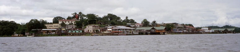 Vista de San Carlos desde el lago Nicaragua